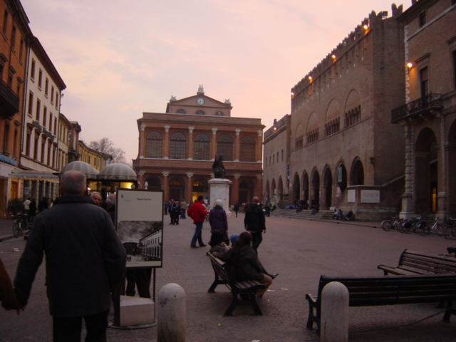 Rimini Piazza Cavour. Foto di Giovanni Dall'Orto, aprile 2004. Rimini Cavour square. Picture by Giovanni Dall'Orto, april 2004.